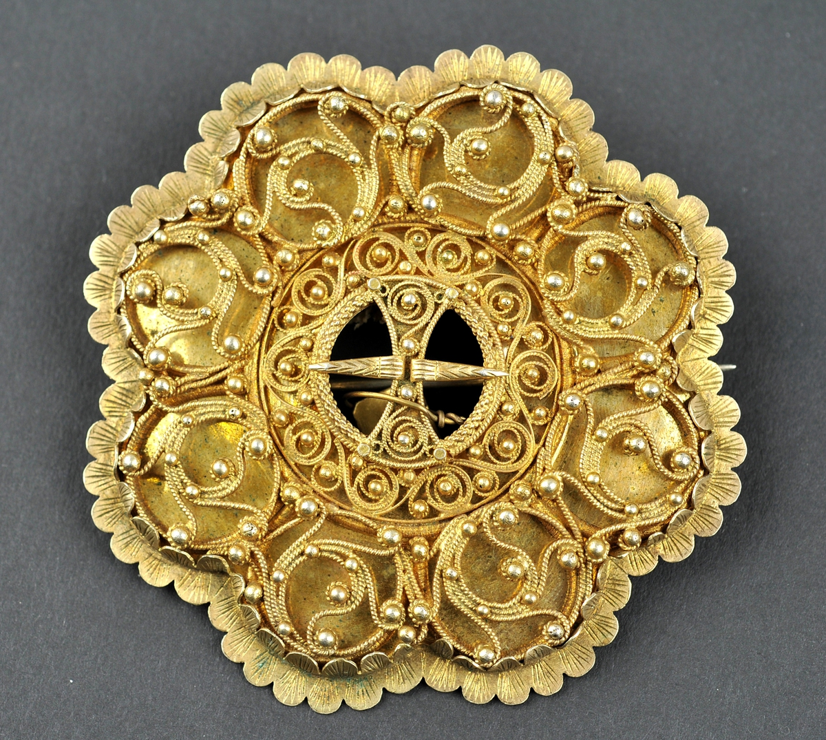 Trandheimsølje i forgylt sølv, laget av Eivind G.Tveiten. Foto Vest-Telemark Museum, LB.0113.